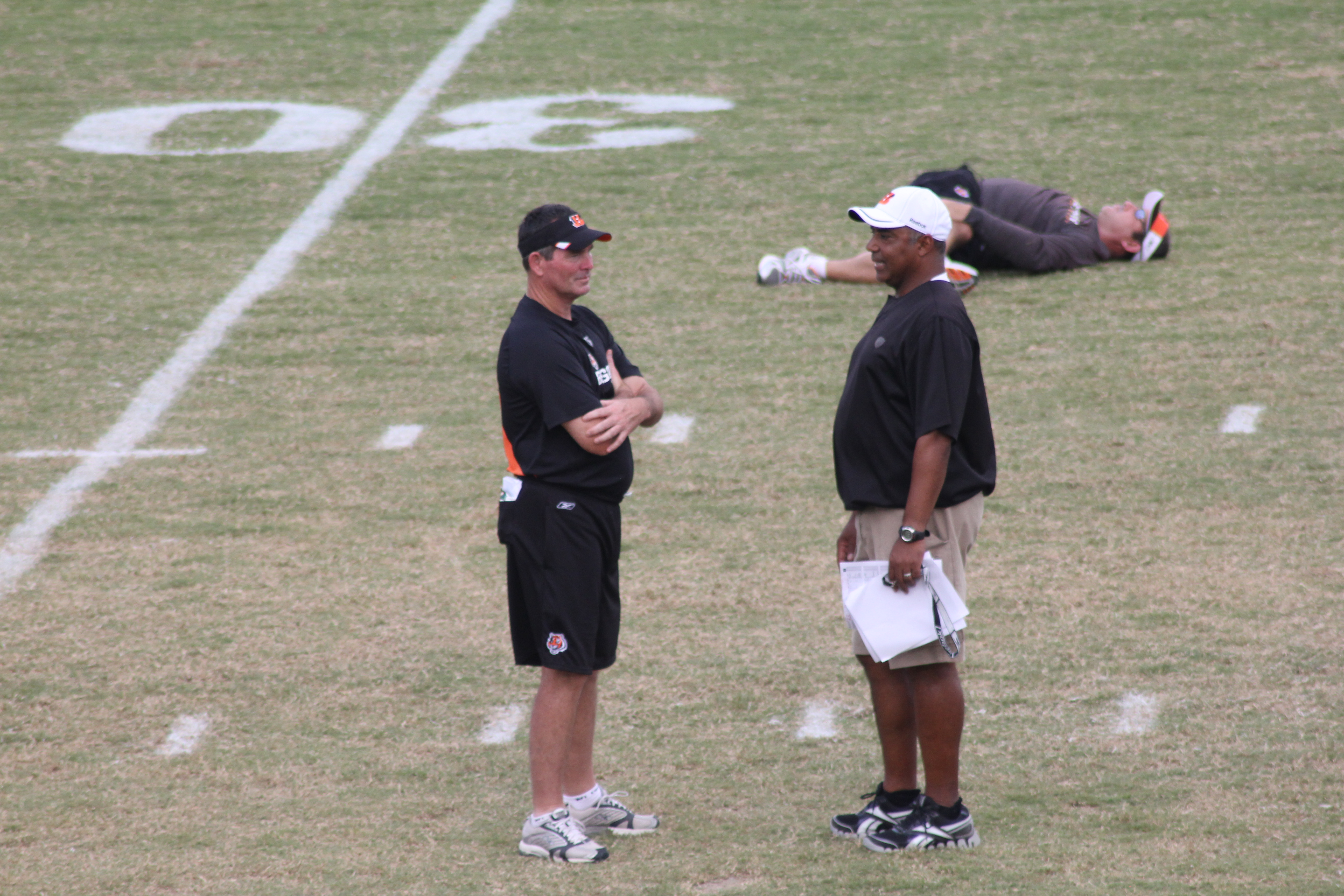 Mike Zimmer & Marvin Lewis